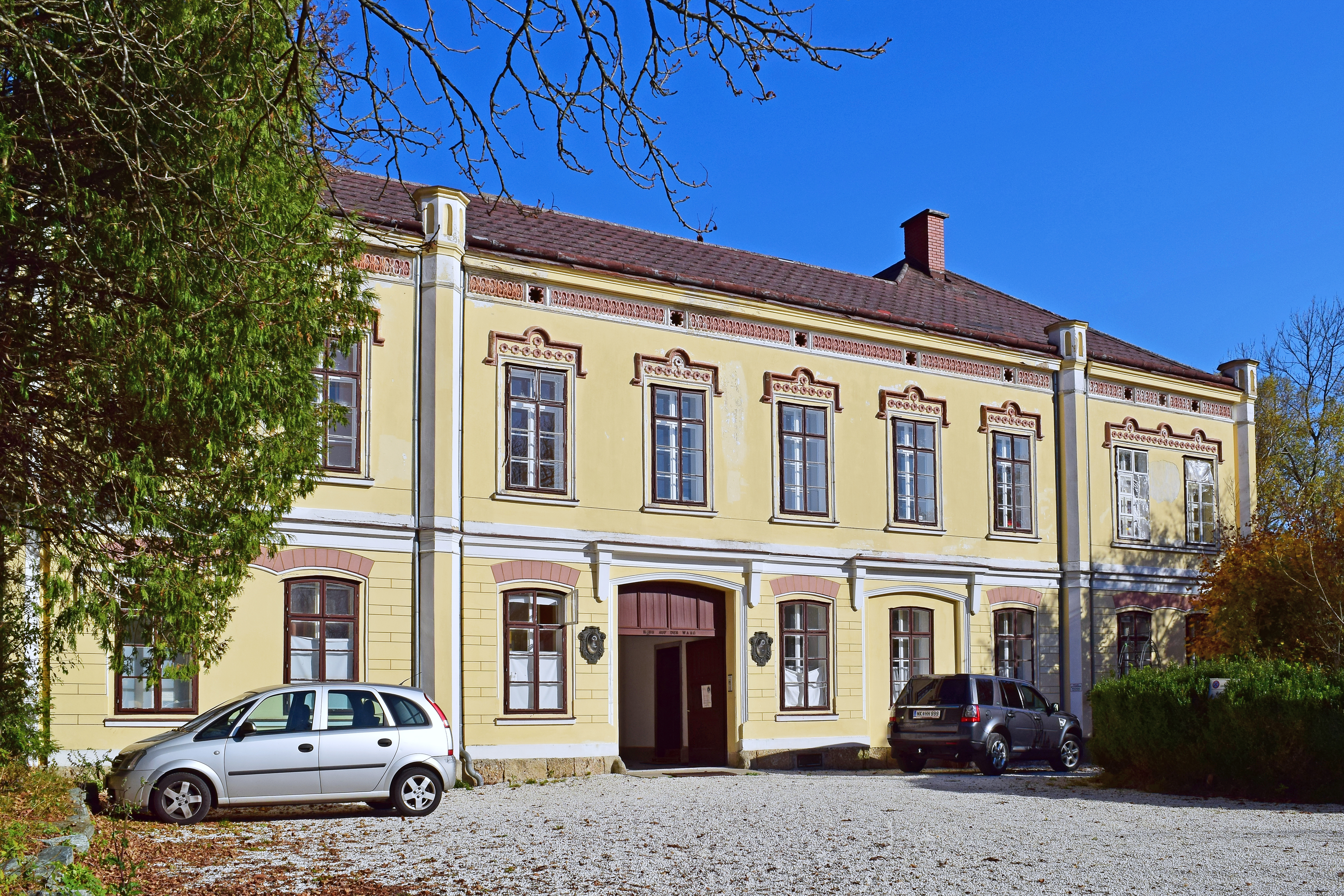 Die Rudolfsvilla an der Thalhofstraße 6 wurde 1856/57 von Anton Hefft errichtet.